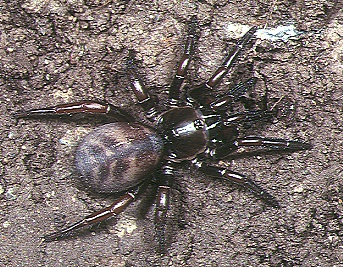 female Latouchia swinhoei swinhoei from Okinawa.